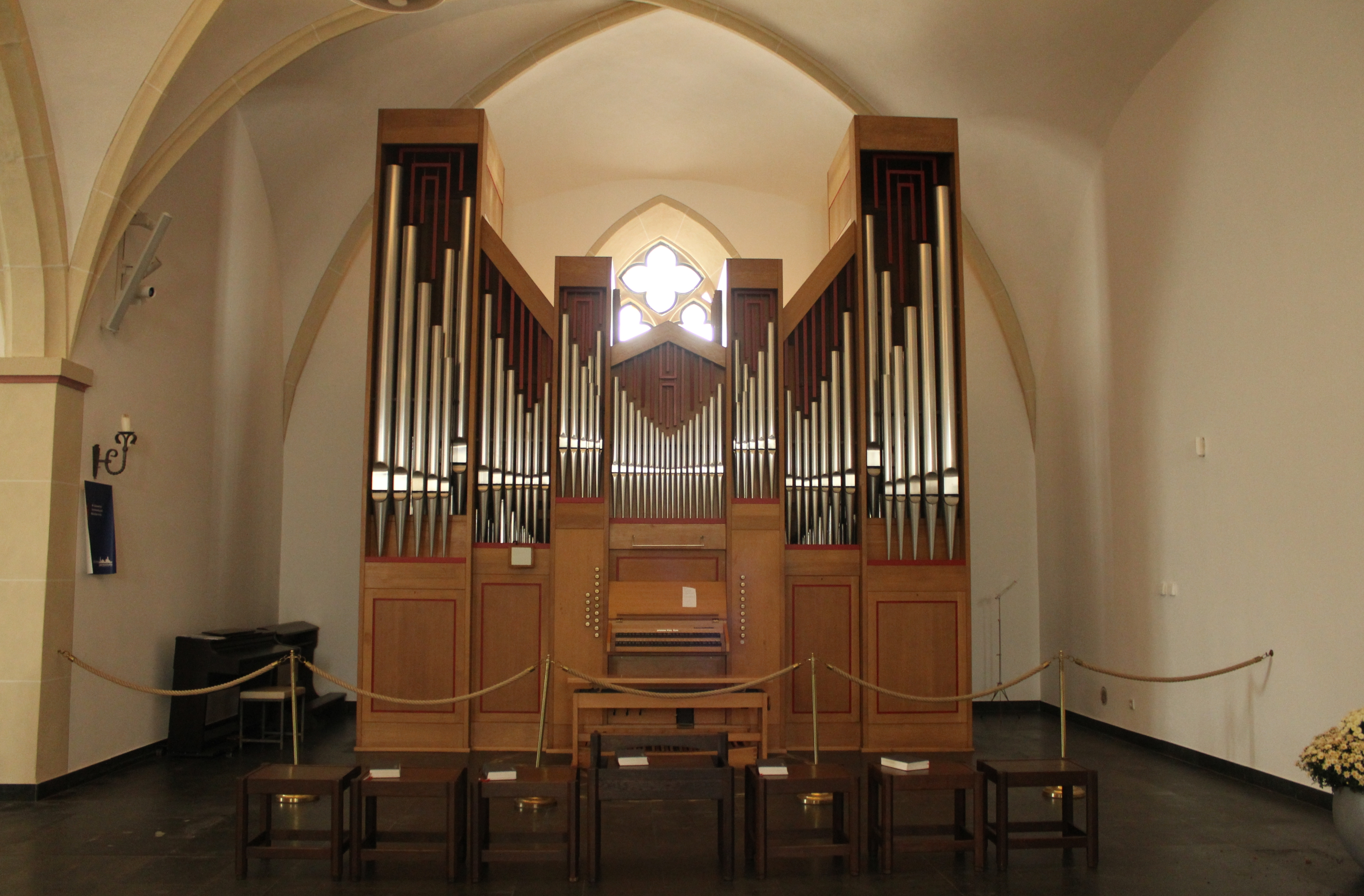 Innenansicht von St. Josef Kinderhaus, Orgel im linken Seitenschiff. 1999 durch die Orgelbaufirma Klais (Bonn) erbaut.